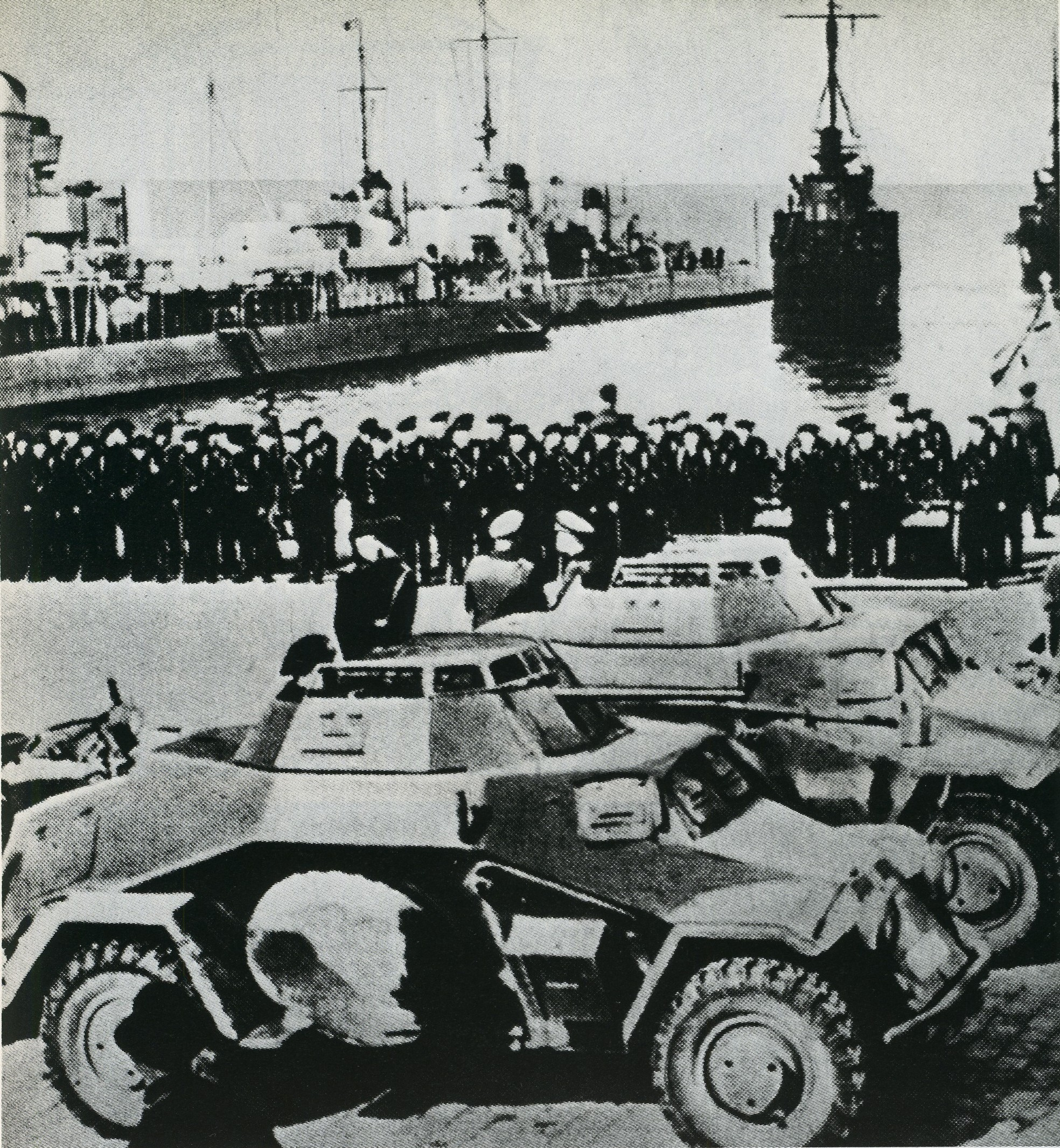 Германские войска и флот в только что присоединенном к Рейху Мемеле, март 1939 года. На переднем плане немецкие лёгкие бронеавтомобили Sd.Kfz.222